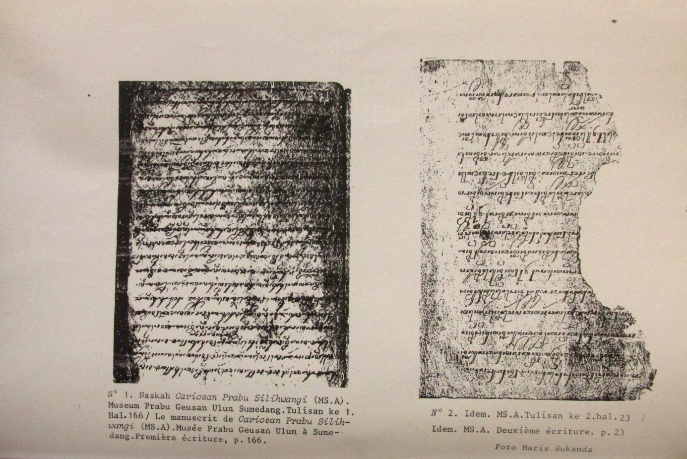 Naskah Cariosan Prabu Siliwangi